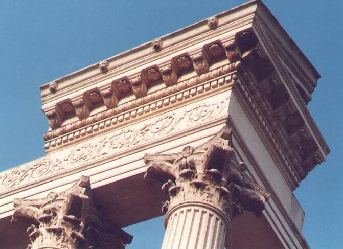 eigen foto